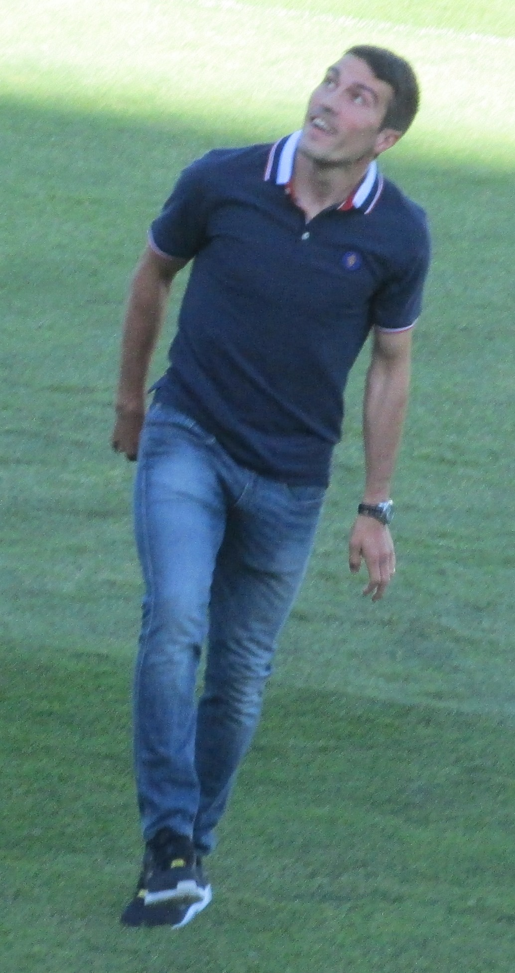 Zapater, Zapater... Zapater te quiero!!!!